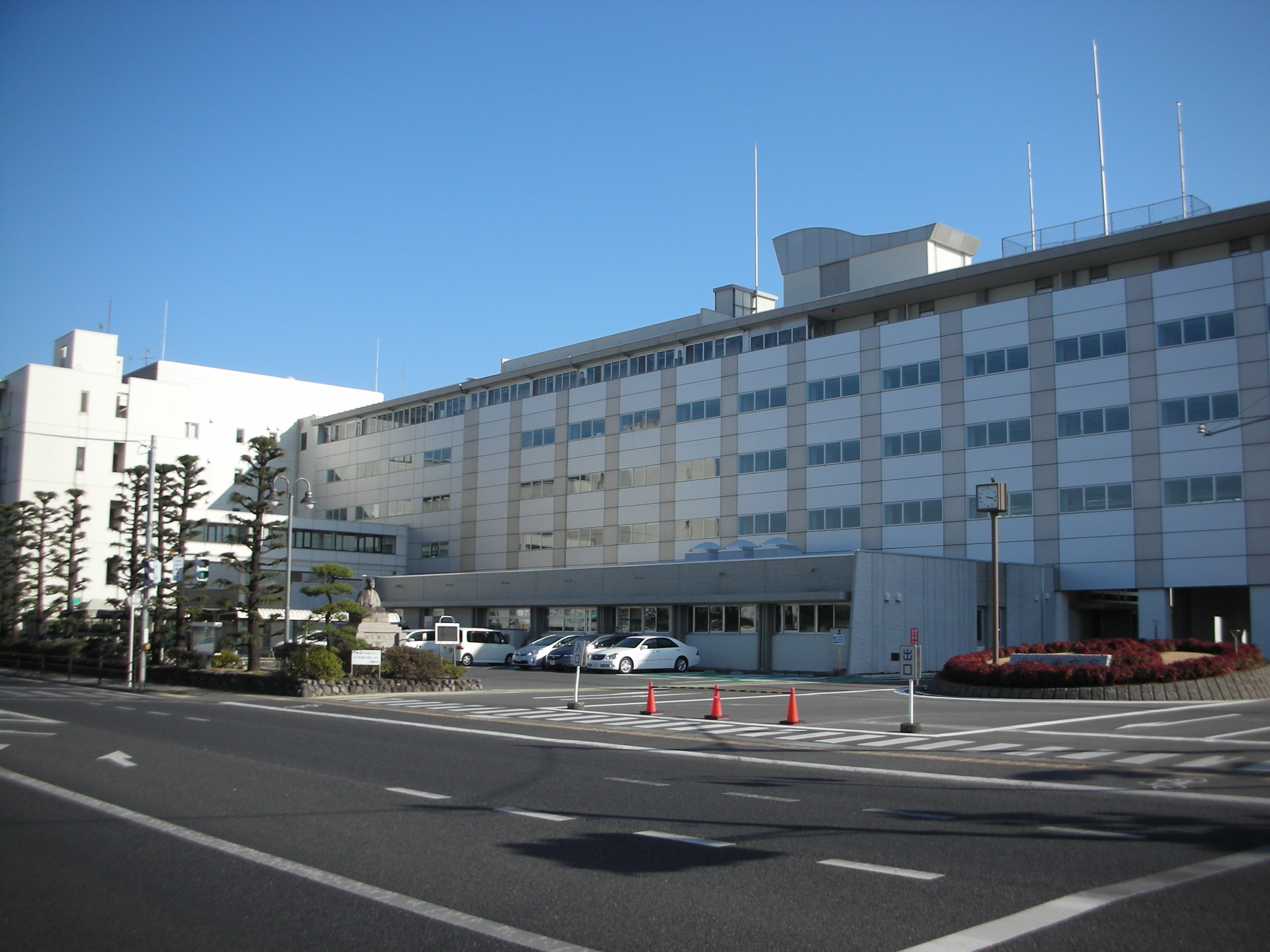 伊勢崎市役所の外観。